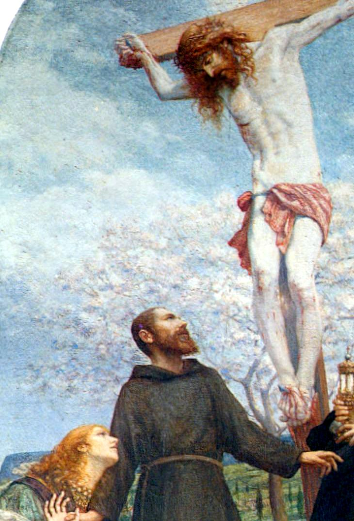 La foto rappresenta l'opera di Fra Paolo - Augusto Mussini descritta nel titolo, conservata nella Chiesa di San Francesco d'Assisi.